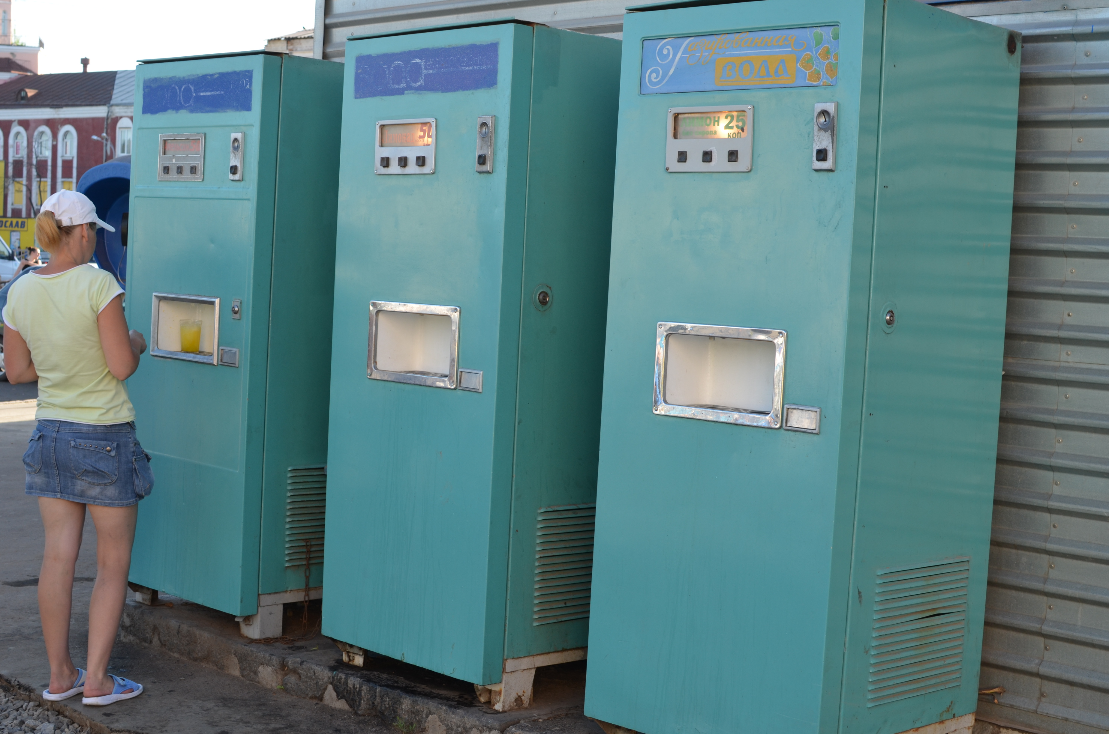 Радянські автомати з газованою водою у Вінниці. Вартість: 25 і 50 копійок (2015 рік)